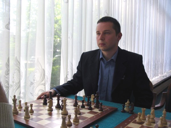 Robert Kempiński, Poznań 2005